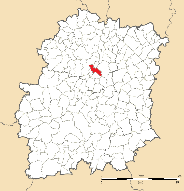 Carte de position de Saint-Germain-lès-Arpajon en Essonne (91)